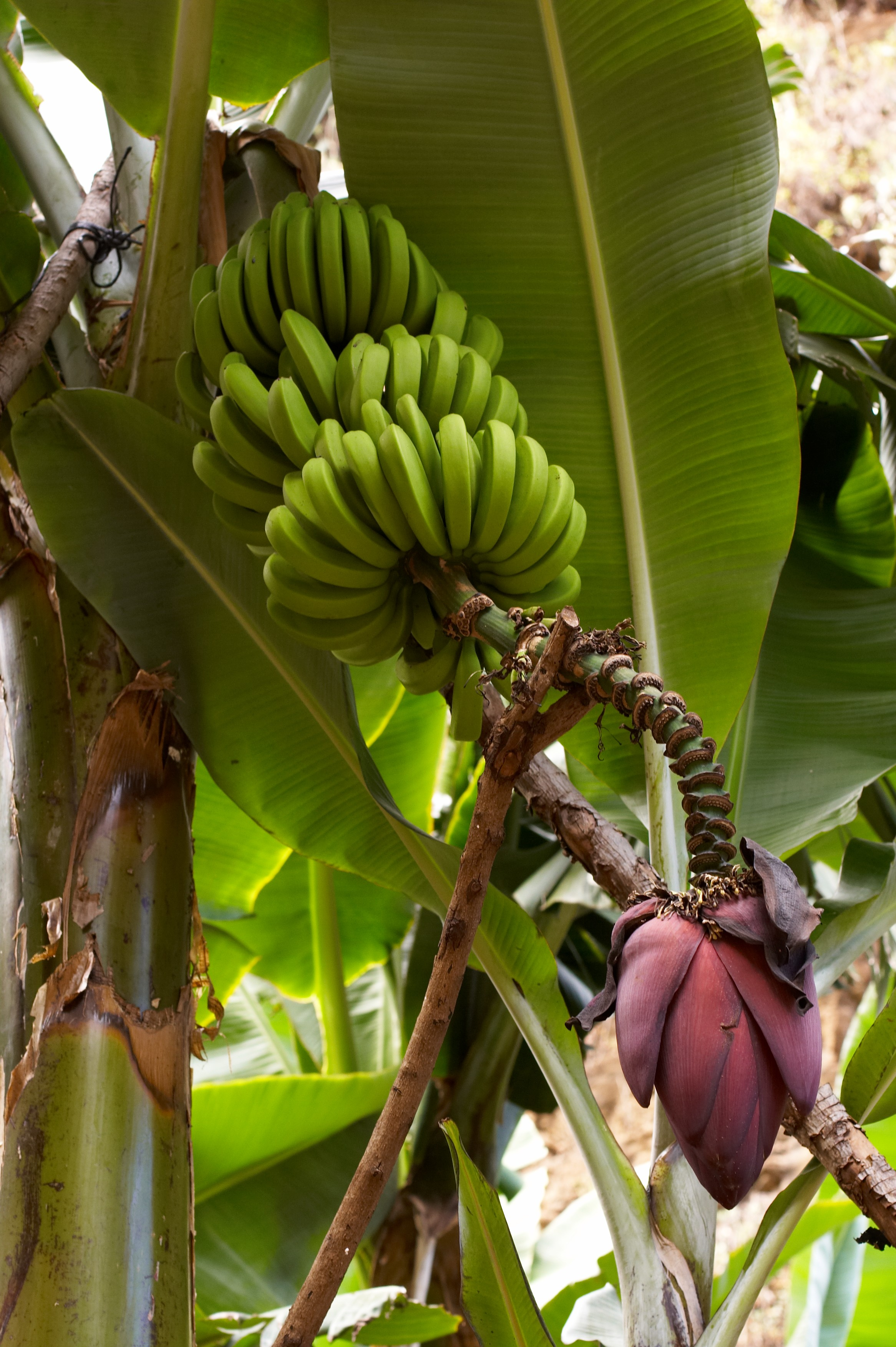 Musa acuminata, La Palma, Canary Islands